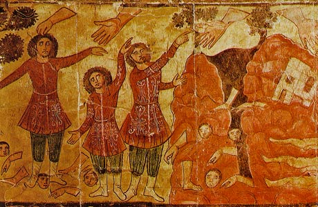 Ezechiels Vision; Fresko aus Dura-Europos